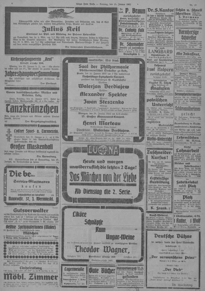 Lodzer Freie Presse, 15. Januar 1922, Anzeigen, Seite 4